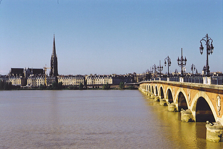 zelf gemaakt